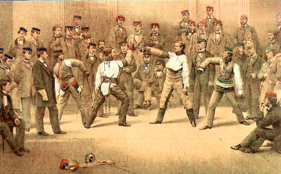 Göttinger Mensur im Jahr 1862 zwischen Fritz Bacmeister (rechts(, Mitglied der Corps Thuringia Jena und Hildeso-Guestphalia Göttingen, gegen stud. Wilhelm Heinroth, Mitglied des Corps Friso-Luneburgia Göttingen (heute: Corps Frisia Göttingen). Die kolorierte Lithographie befindet sich in der Sammlung des Instituts für Hochschulkunde in Würzburg sowie auf dem Haus des Corps Frisia in Göttingen.